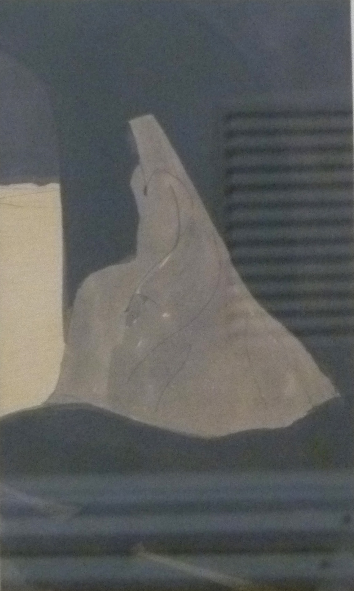 "Prinses Maleine" (1917); gewassen Oost-Indische inkt, penseel, kleurpotlood op papier (26 x 18 cm) door de Belgische kunstschilder Léon Spilliaert (1881-1946); privéverzameling